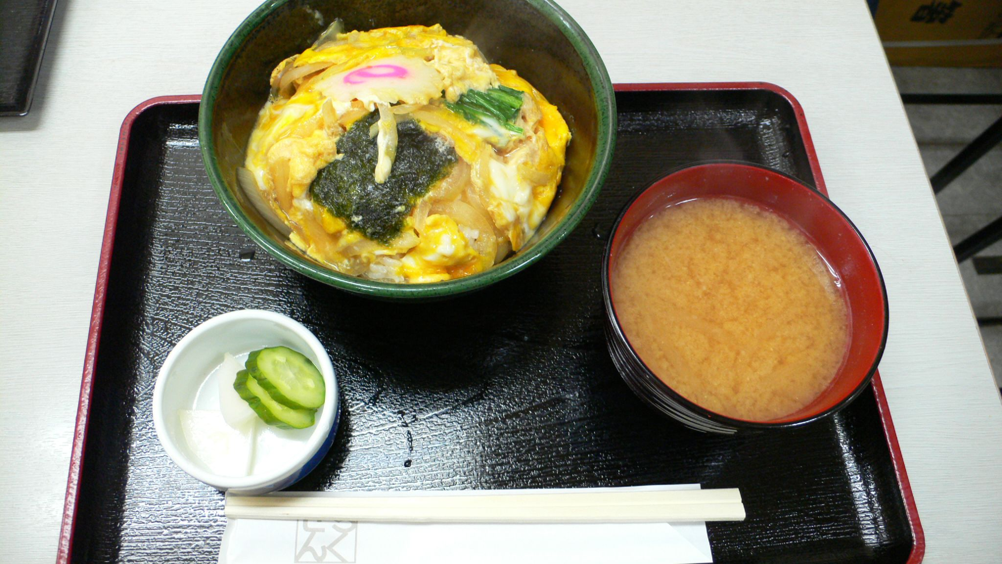 Tamagodon (玉子丼)